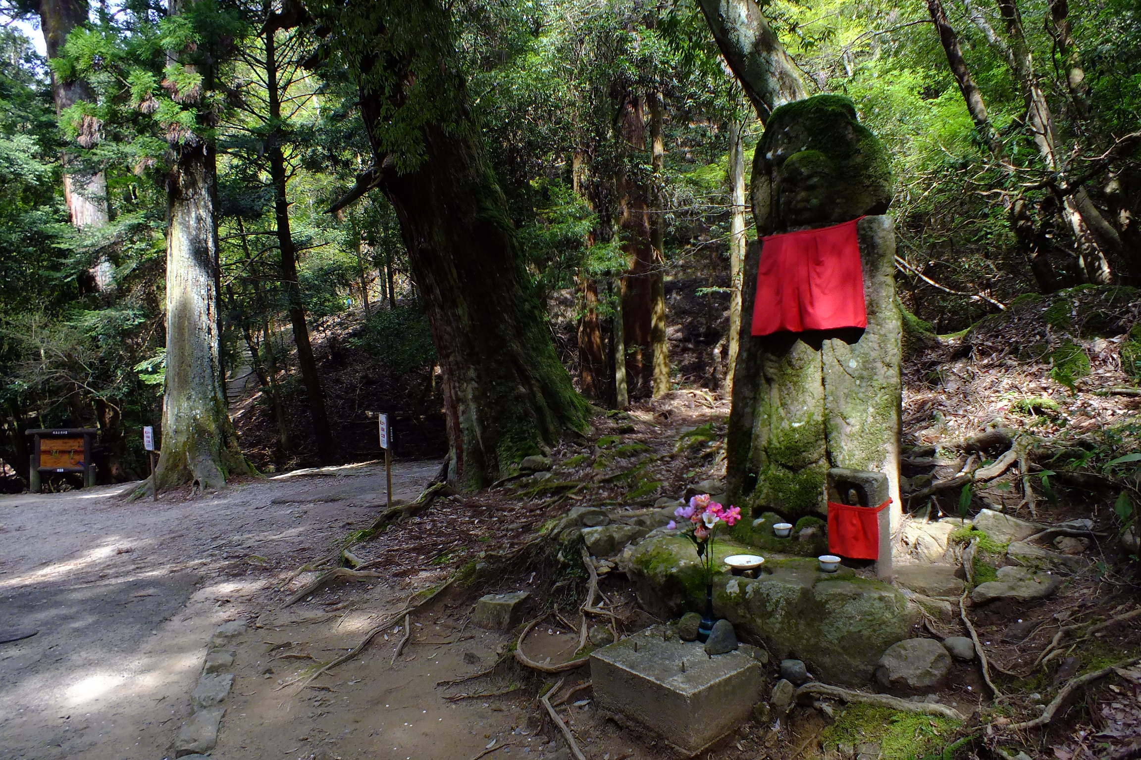 2017-04-22 Kubikiri Jizo in Yagyu Kaido 首切り地蔵